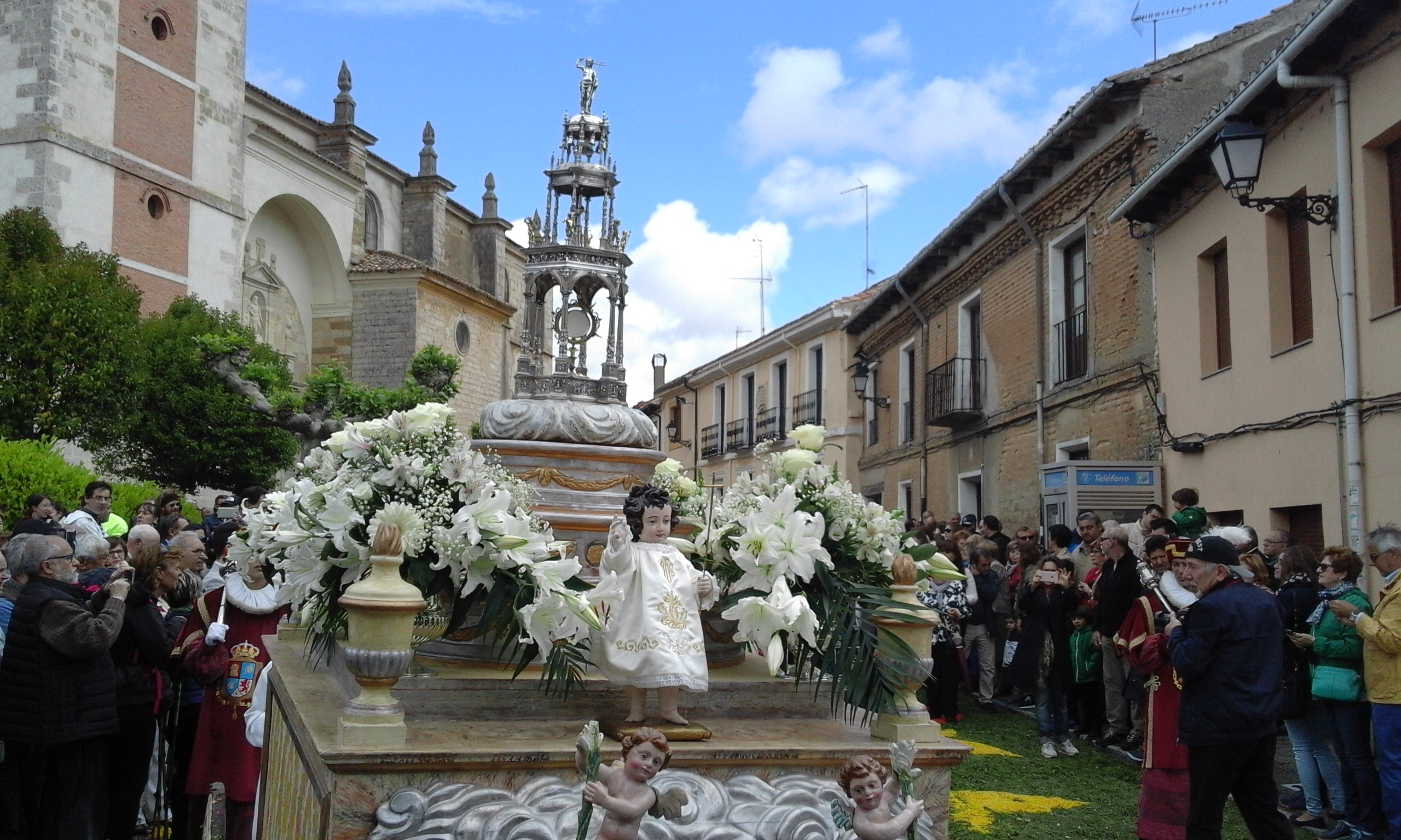 Custodia de plata de Carrión de los Condes, que procesiona el día del Corpus Christi